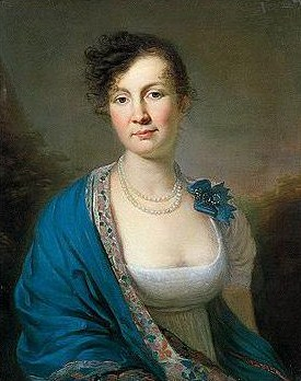 Портрет графини Натальи Александровны Зубовой (1775-1844), ур.Суворова